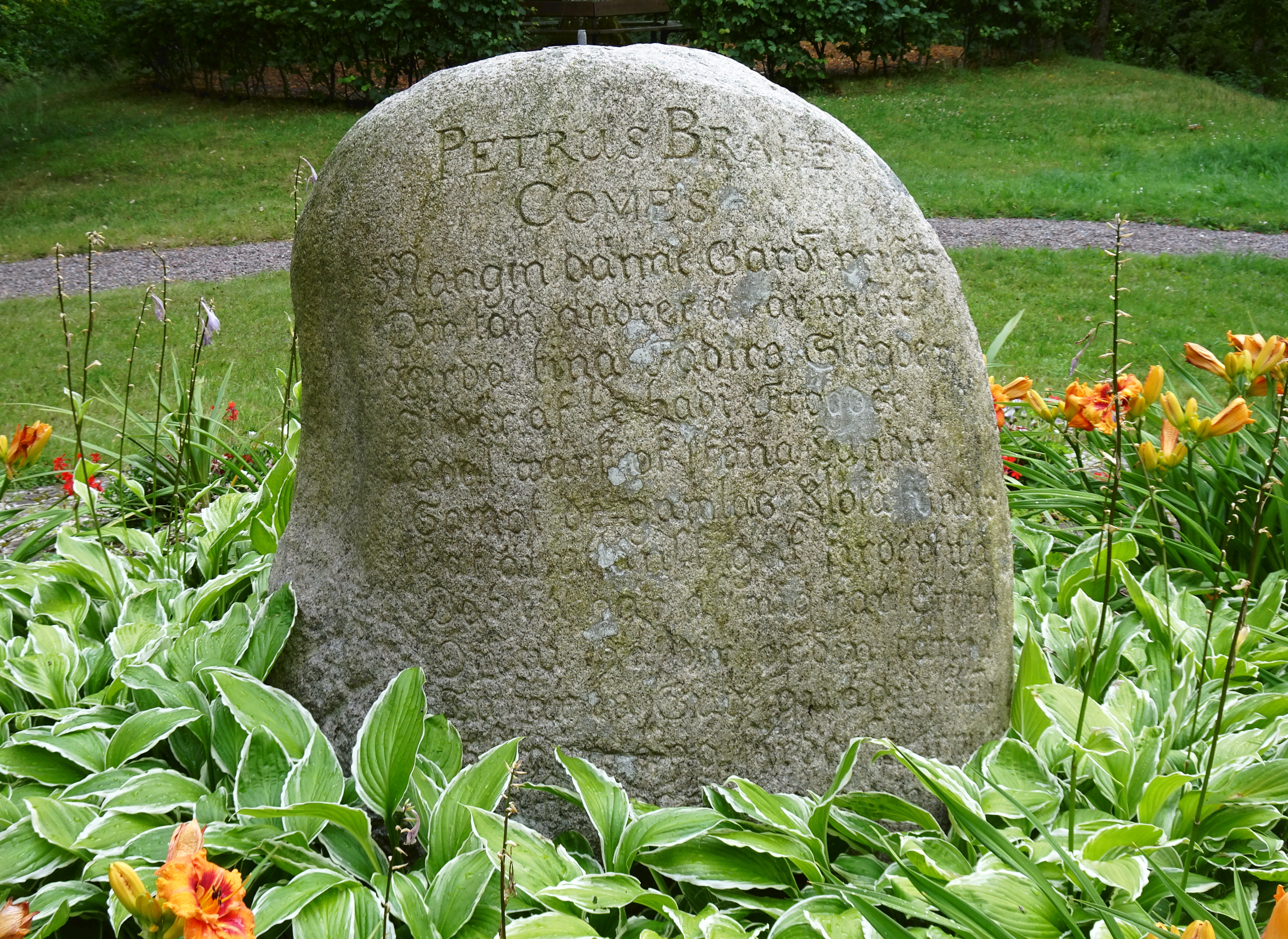 Bogesunds Gårdssten från 1670. RAÄ-nummer Östra Ryd 7:1